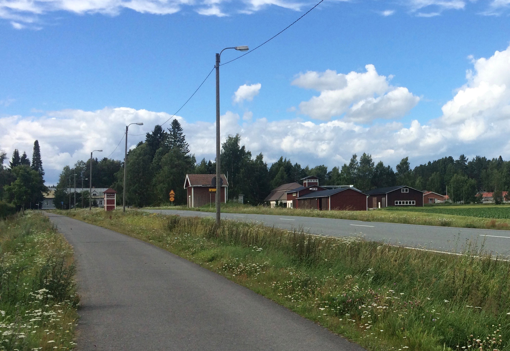 Hauhon Eteläisten kylää seututie 305:n varrelta pohjoiseen kuvattuna.